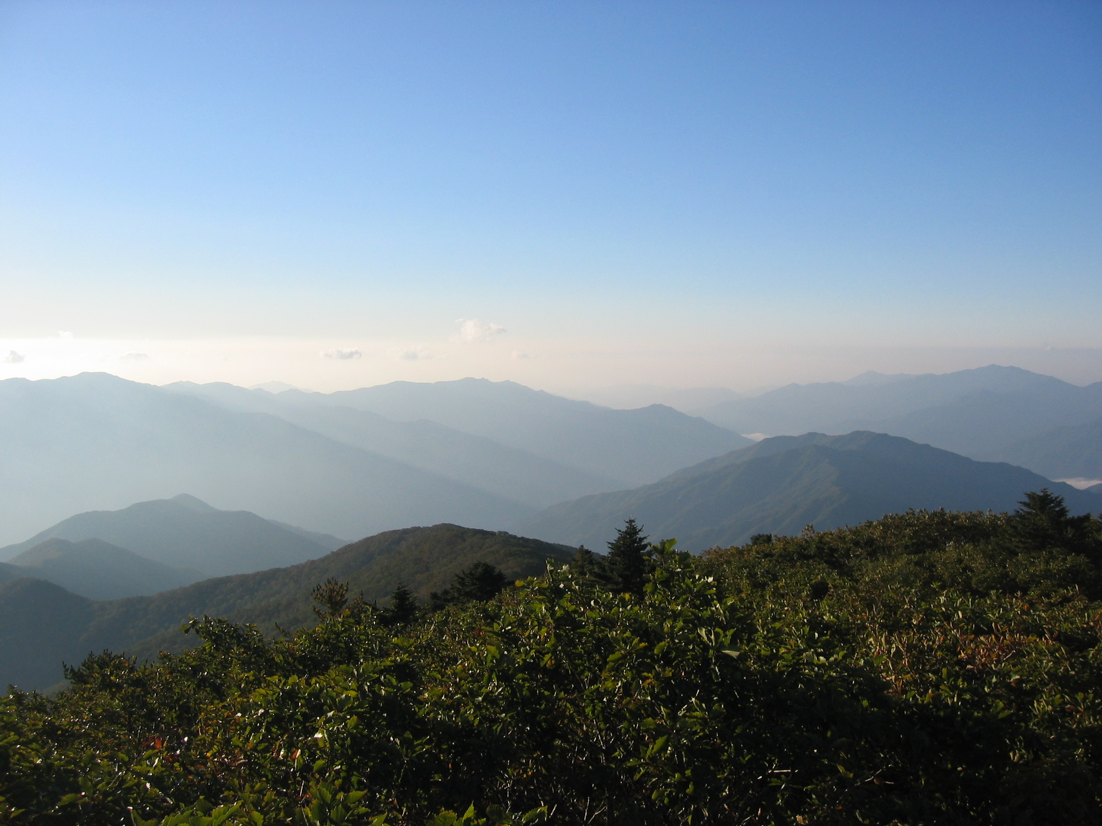 2006년 대한민국 지리산의 모습 The scenery of Jirisan, in South Korea, 2006